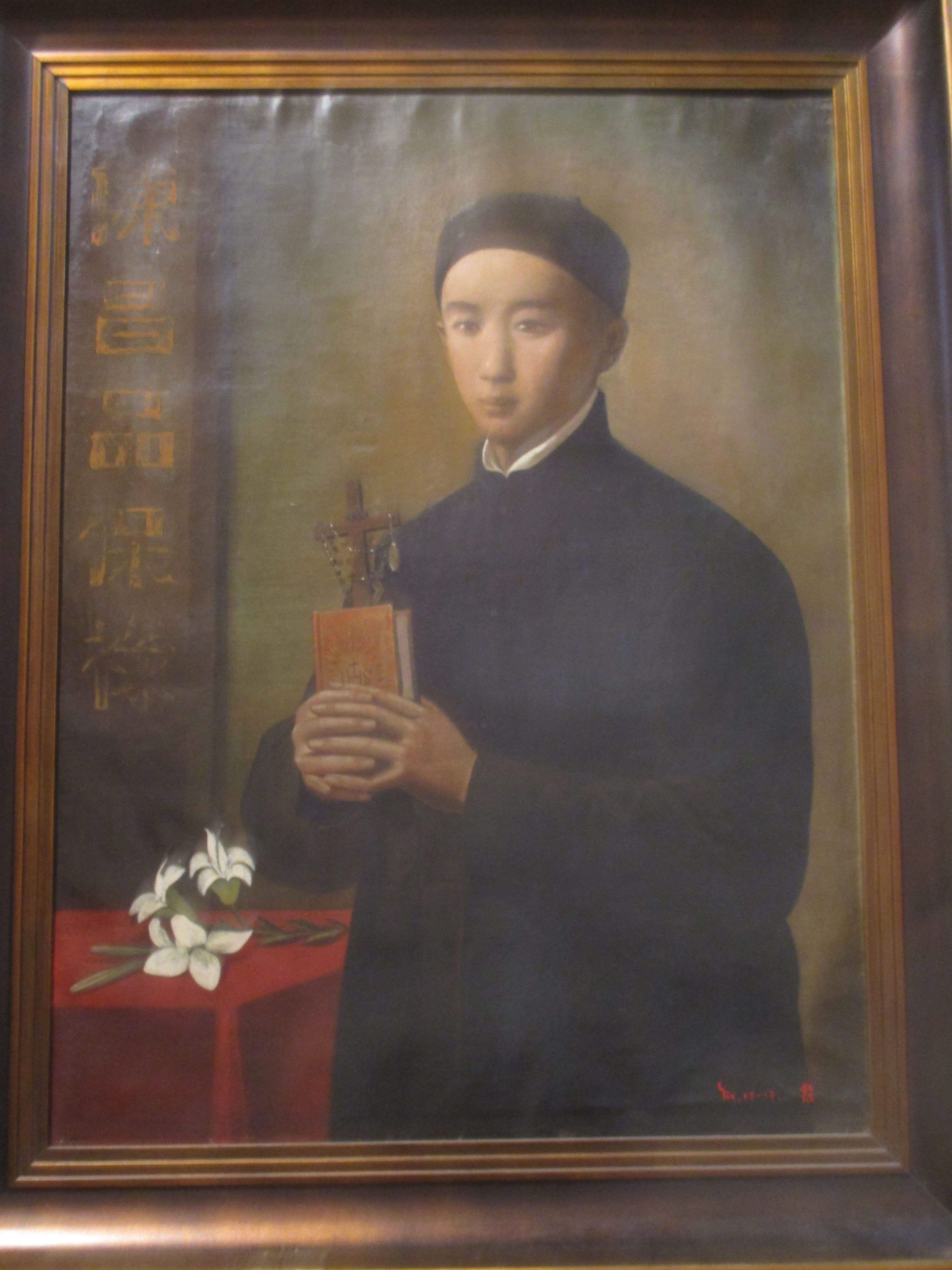 Saint Paul Tchen (1838-1861), séminariste chinois du grand séminaire de Tsin-gay, né dans le Kouy-tchéou (Guizhou) décapité en 1861 et canonisé en 2000. Chapelle de la Sainte-Enfance de la cathédrale Notre-Dame de Paris, bas-côté Nord.